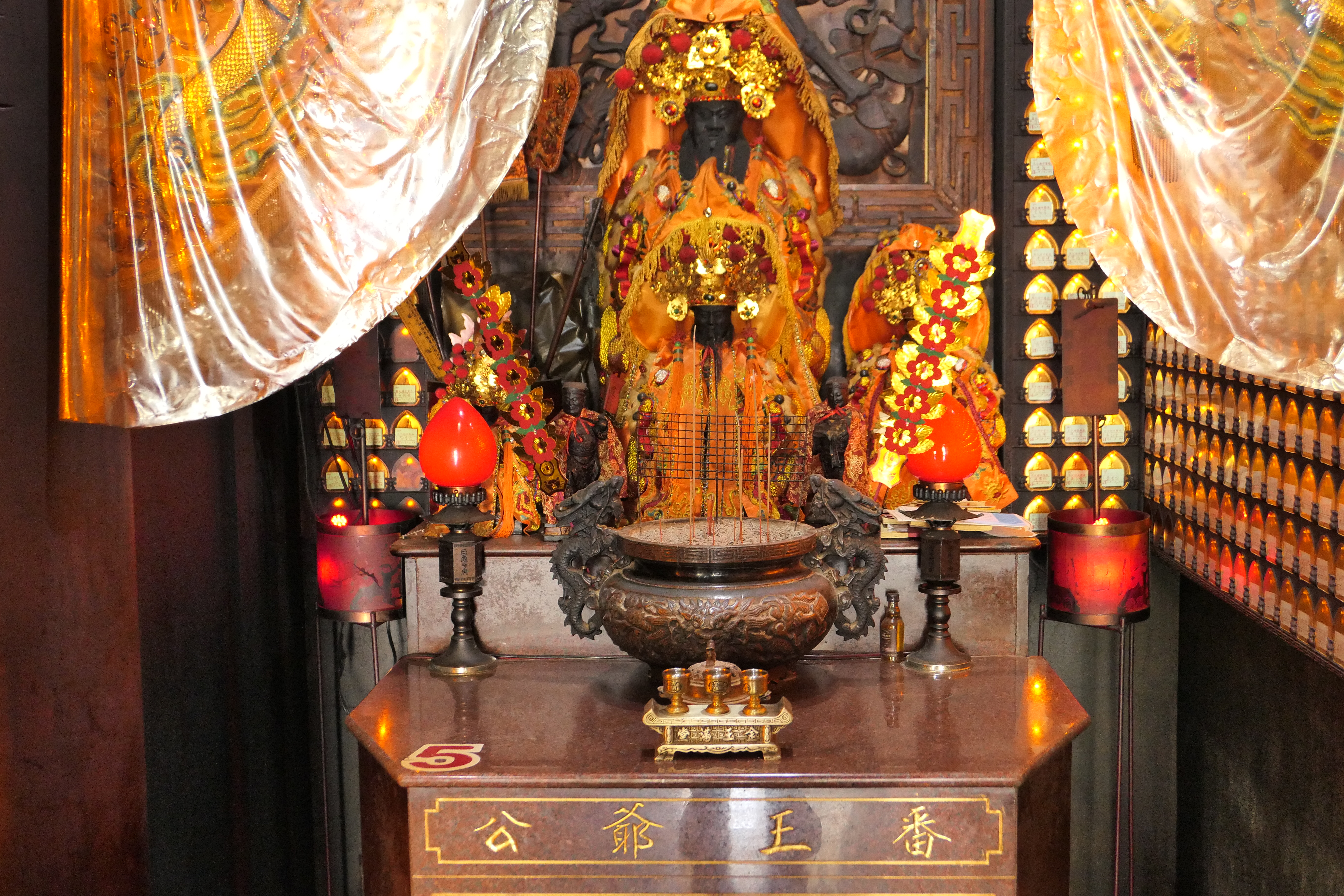 中文（台灣）: 福社宮番王爺公